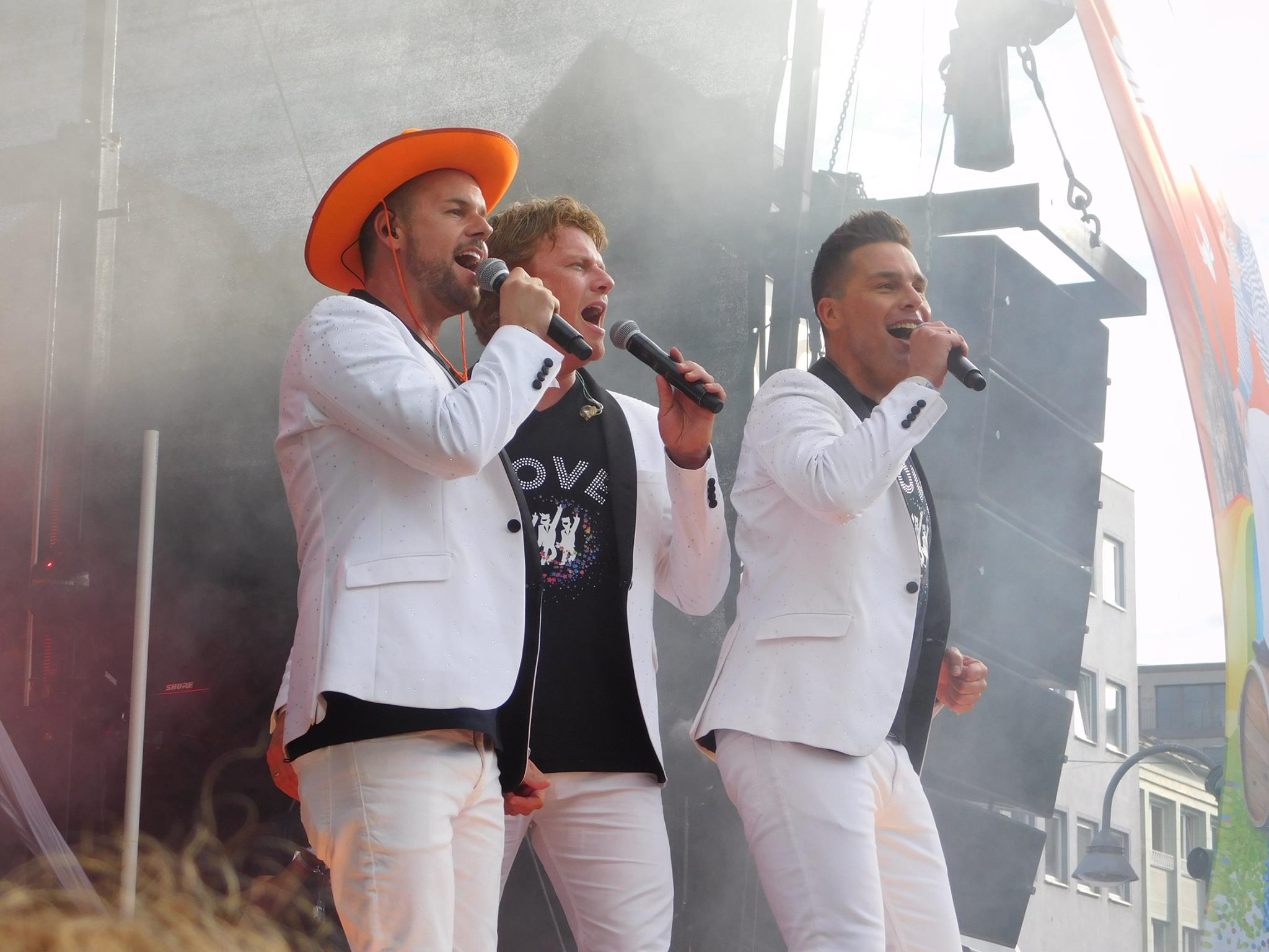 Caught in the Act beim Cologne Pride 2016